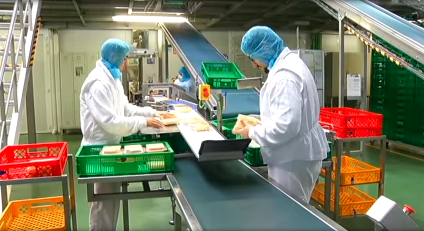 El Presidente visita el centro logístico de la empresa Entrepinares en el polígono de las Arenas de Valladolid.